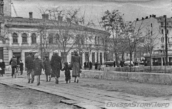 Вигляд на будинок Маюрова (Круглий дім). Кінець 1940-х років